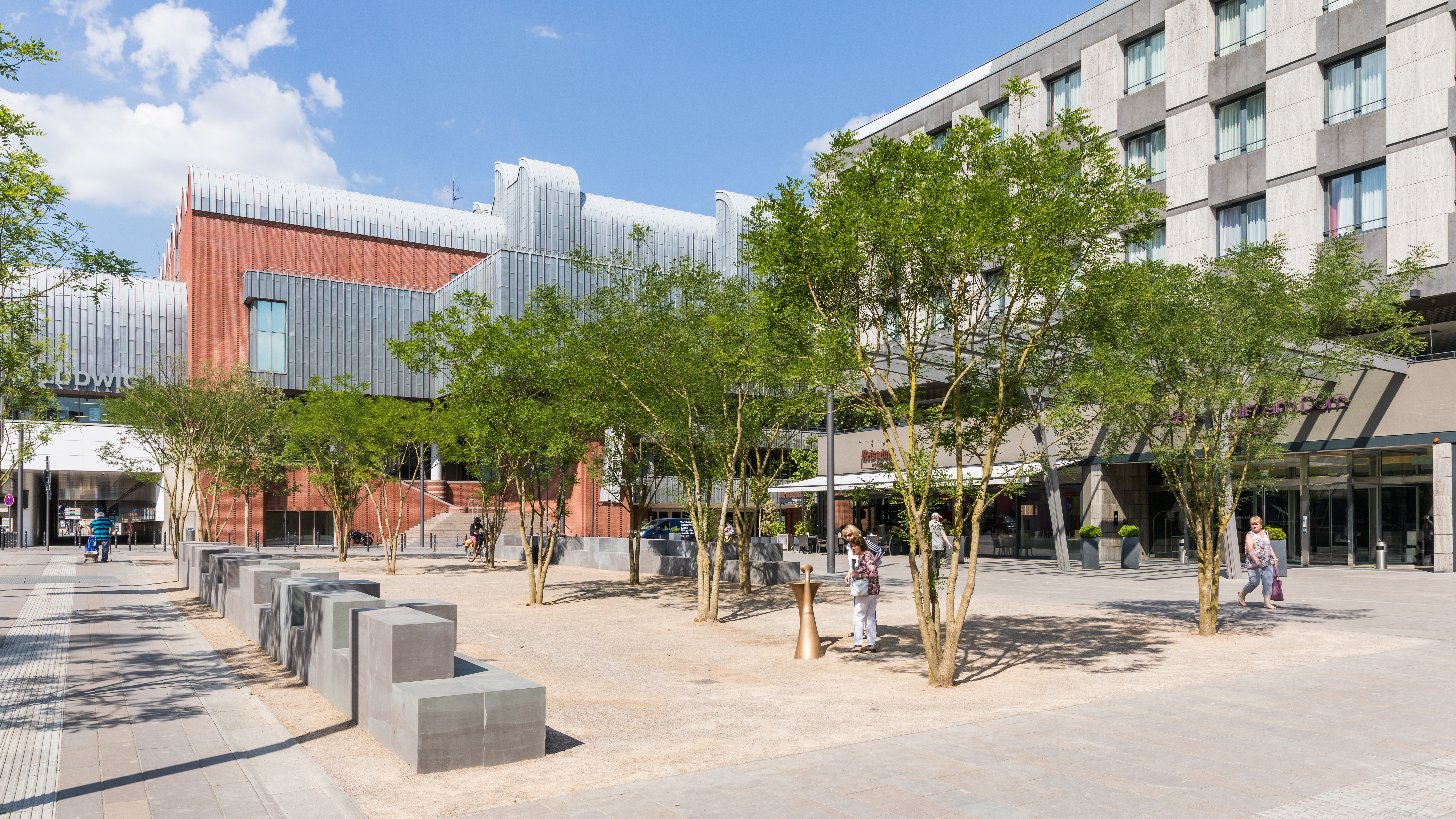 Kurt-Hackenberg-Platz Köln, nach Neugestaltung, Mai 2018. Mit japanischen Schnurbäumen, Steinbänken und einen Trinkwasserbrunnen